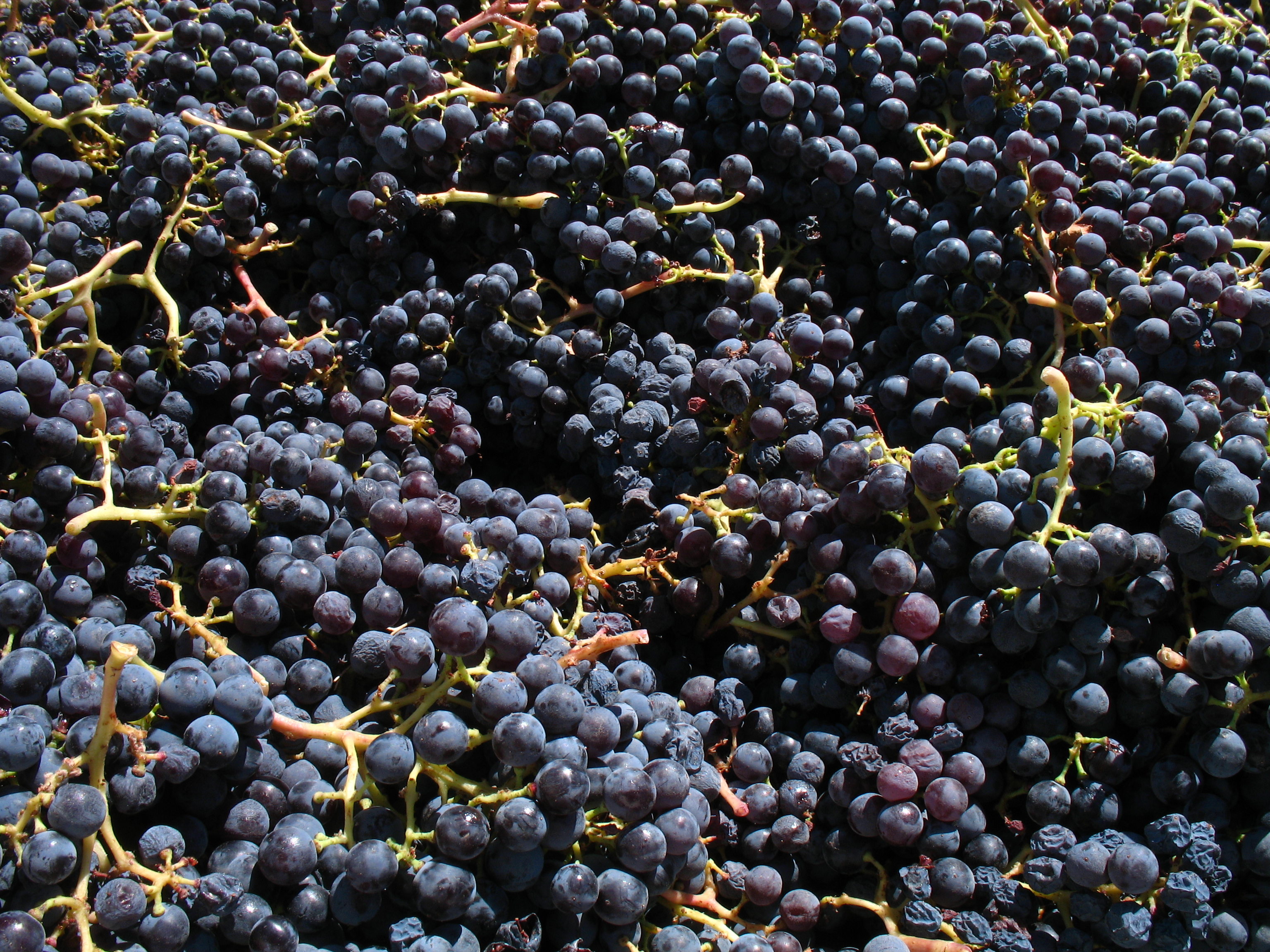 Grenache grapes from Santa Barbara California